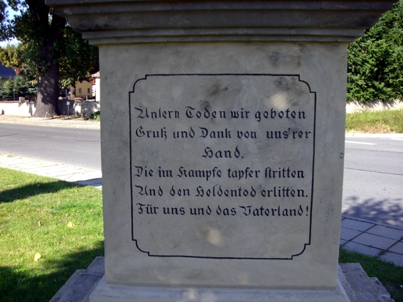 Stolzenhain, Denkmal für die Opfer des Deutsch-Französischen Krieges 1870/71